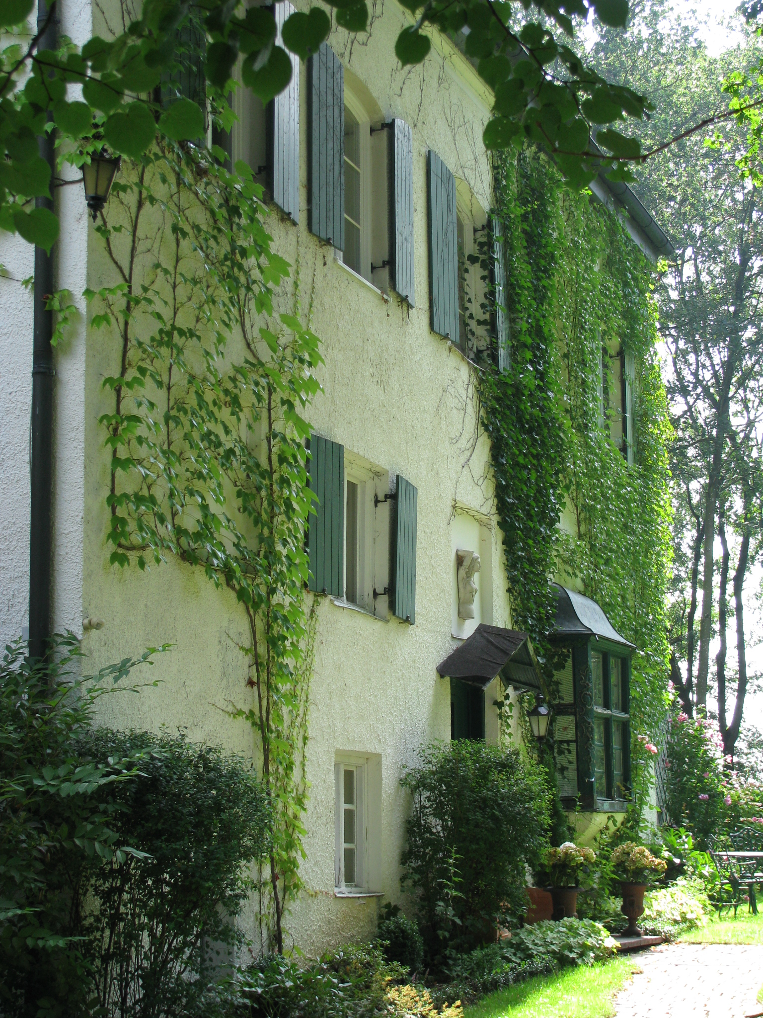 Schloss Ottenburg im Landkreis Freising, Bayern, Südostfassade